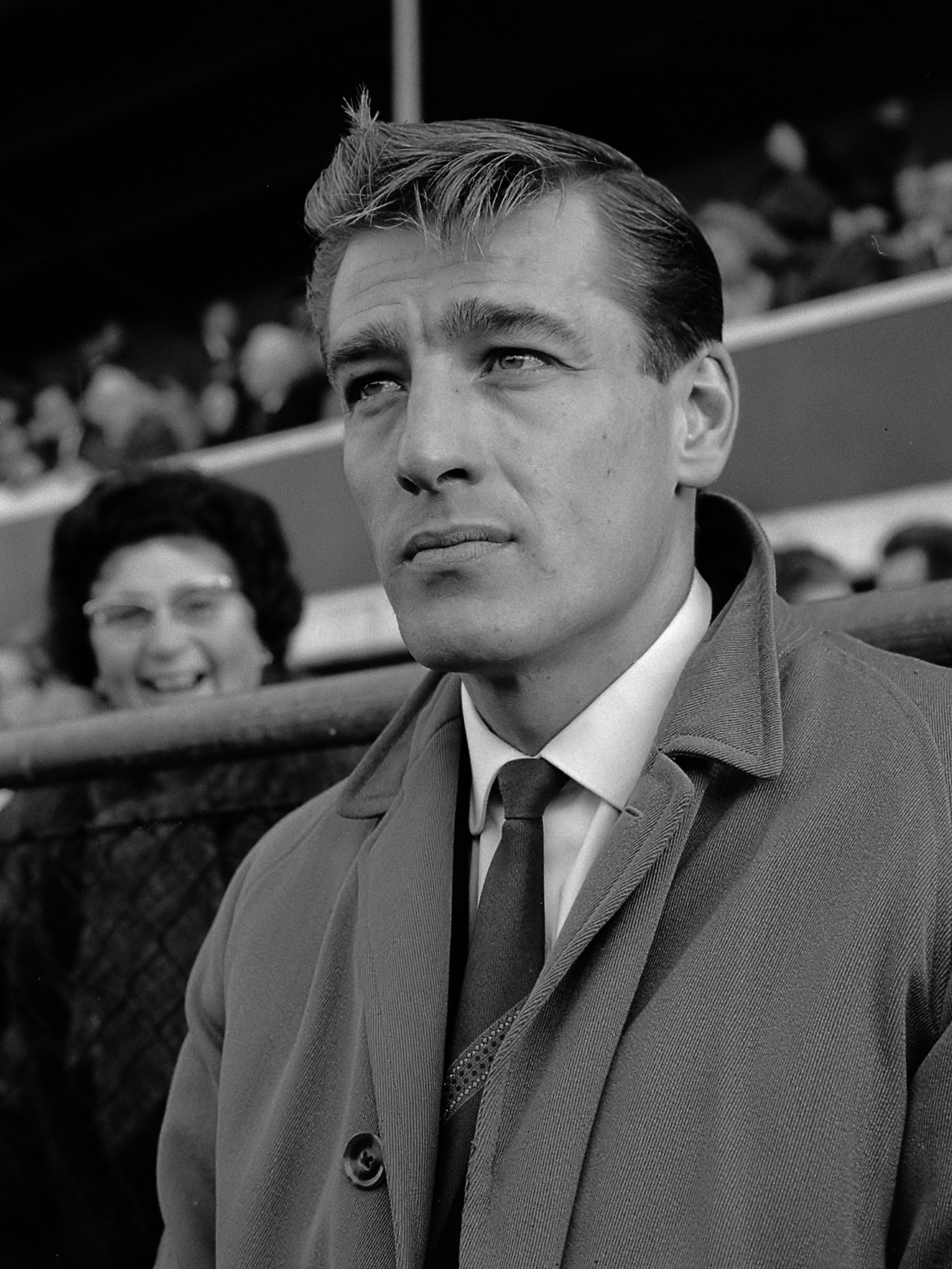 Volendam tegen Blauw-Wit 1-2, trainer Blauw-Wit Keith Spurgeon 18 oktober 1964